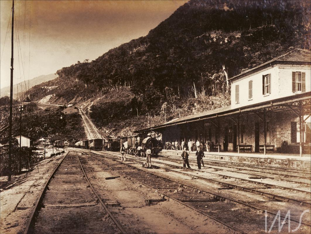 Álbum Fotografias de São Paulo 1900 - Alto da Serra - São Paulo Railway Gaensly, Guilherme Data: 1890 décad Descrição: P&B ec3140cea42291dfd4fe15a423293d099494cm; s.s. 24,5 X 33 cm (álbum) Gelatina/ Prata Assuntos: Álbum Fotografias de São Paulo 1900 Localidade: Serra do Mar SP Brasil Fonte: Mestres do Séc. XIX